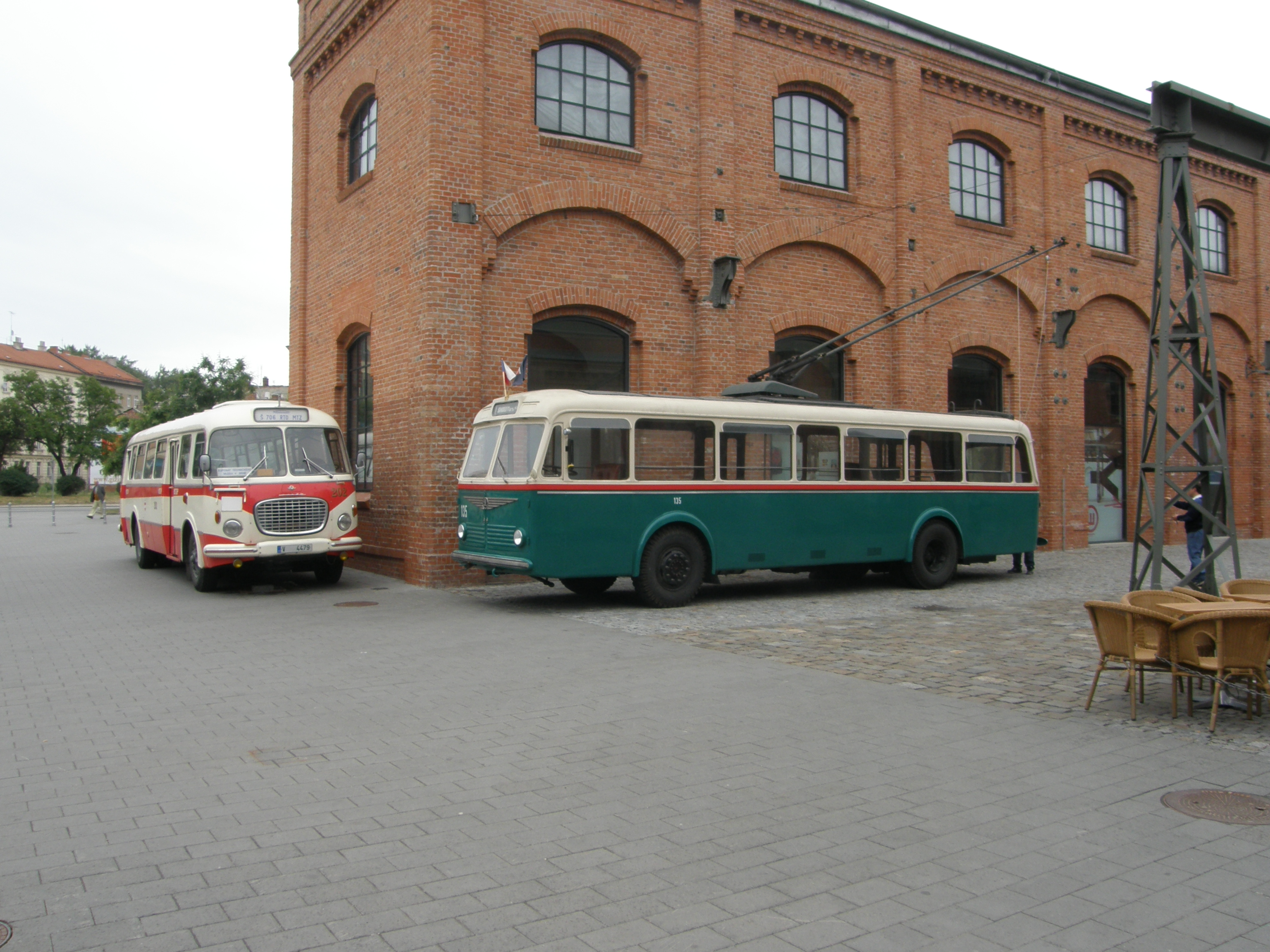 Škoda 706 RTO MTZ a Škoda 6Tr (e.č. 135) u Vaňkovky v rámci výstavy "140 let MHD v Brně"